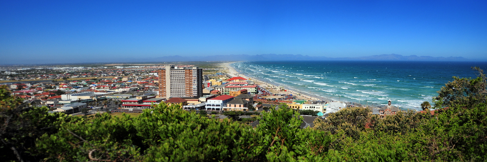 Muizenberg, Cape Town